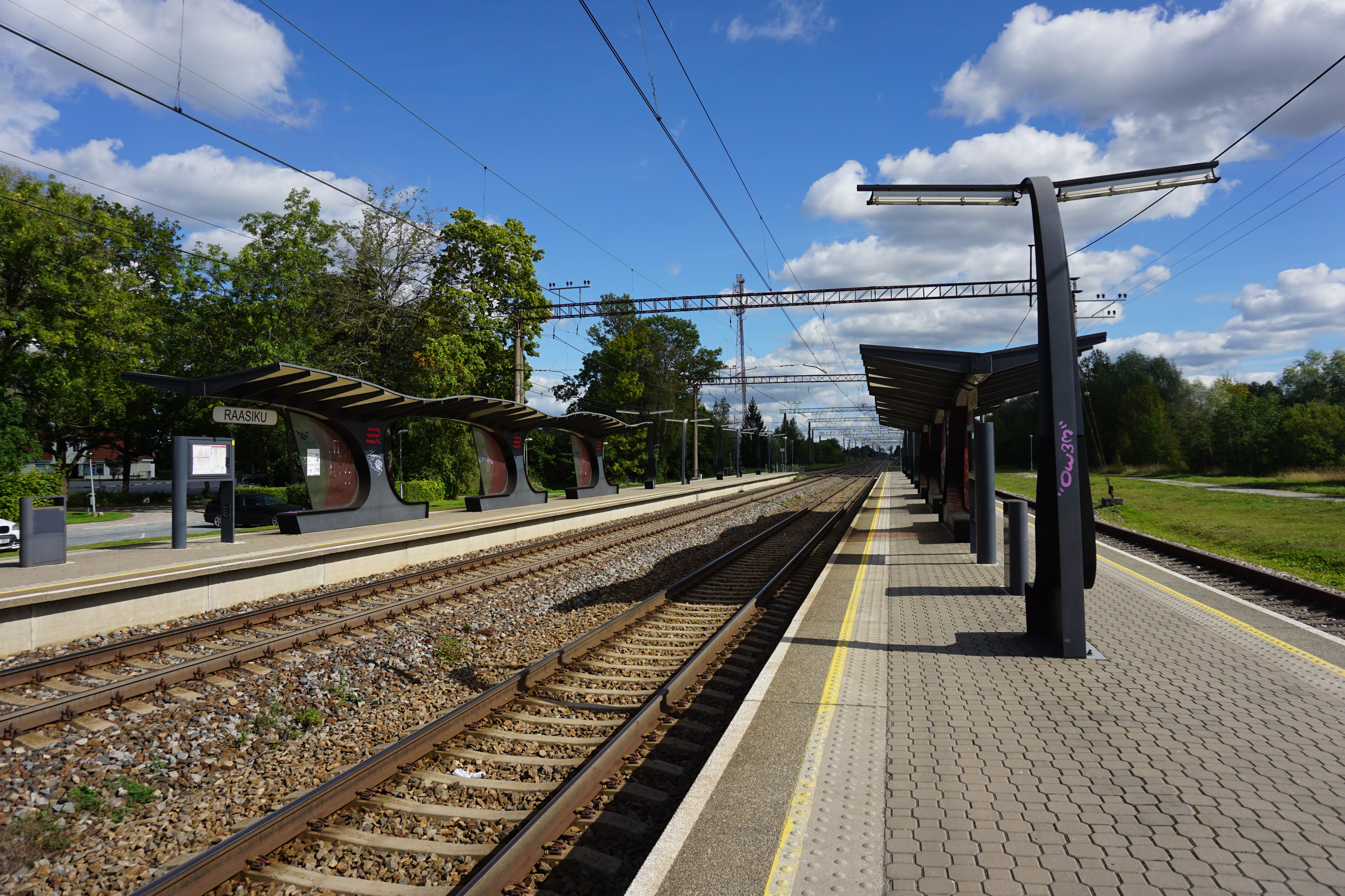 Ooteplatvormid Raasiku jaamas